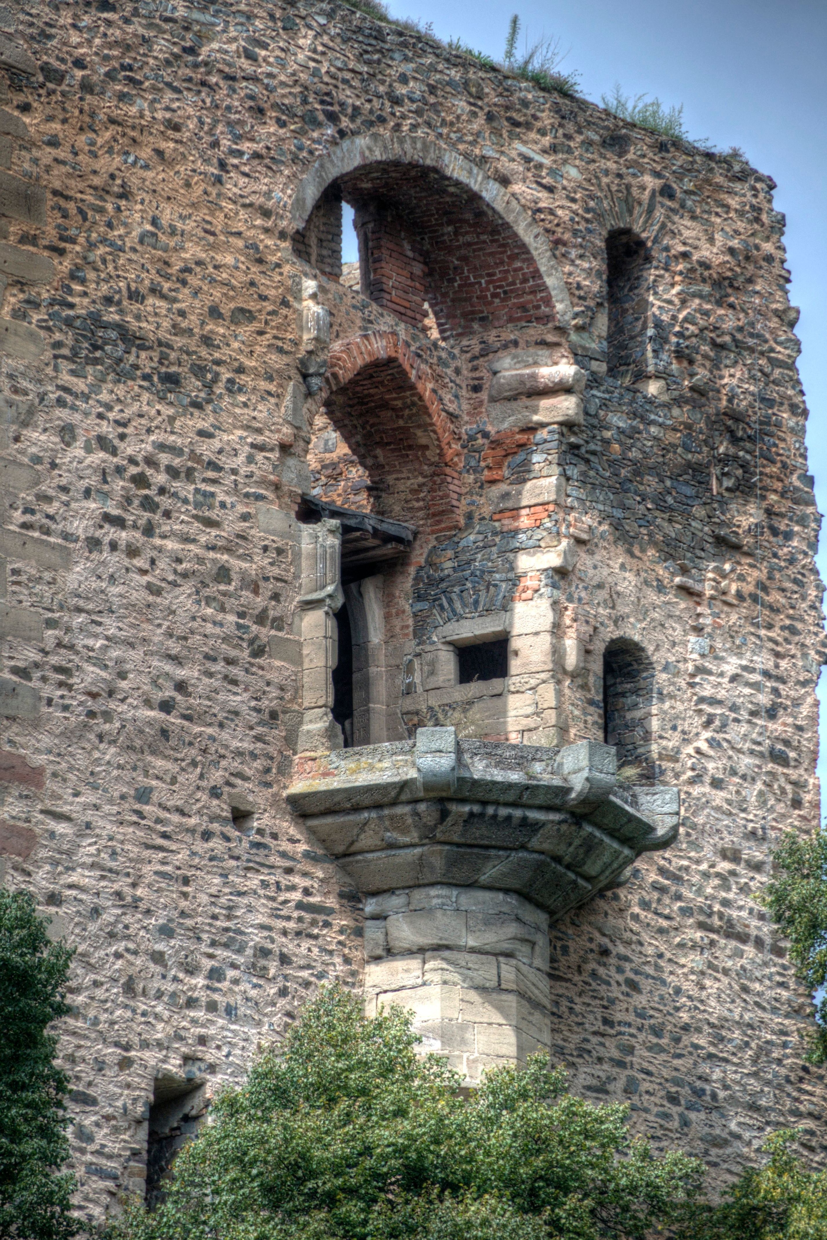 Zbytek arkýře presbyteria kaple Panny Marie a sv. Kateřiny